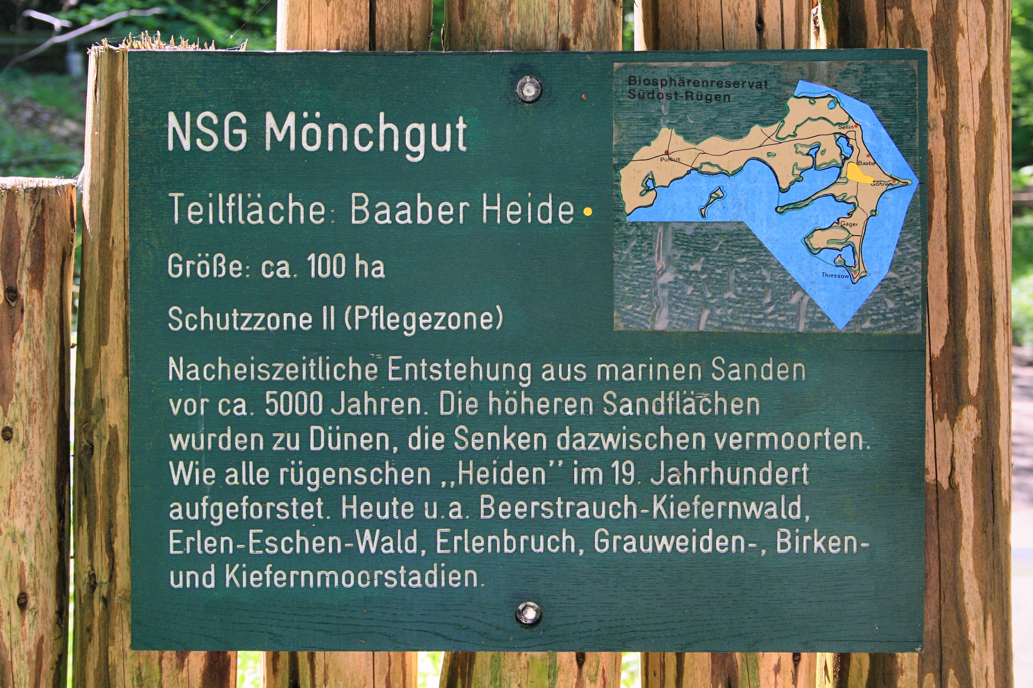 Informationstafel am Zugang zum Naturschutzgebiet Mönchgut auf der Ostseeinsel Rügen